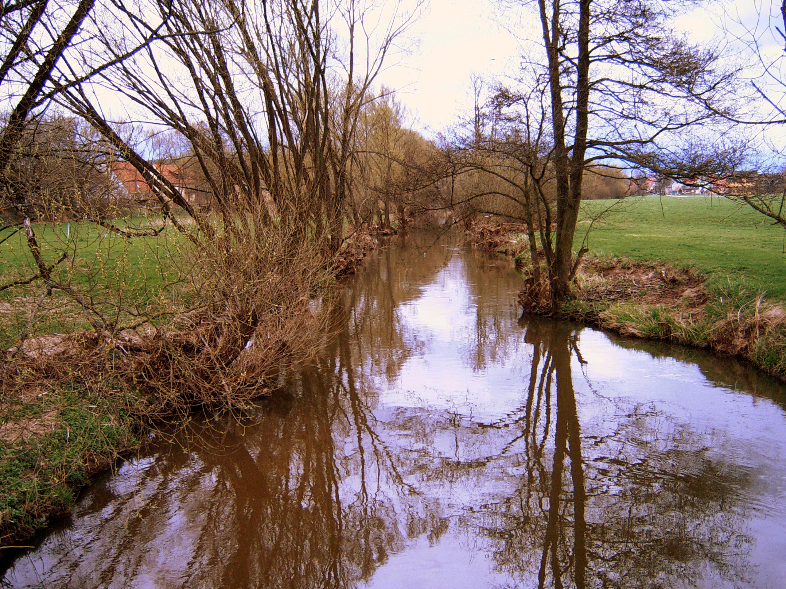 Fränkische Rezat bei Georgensgmünd